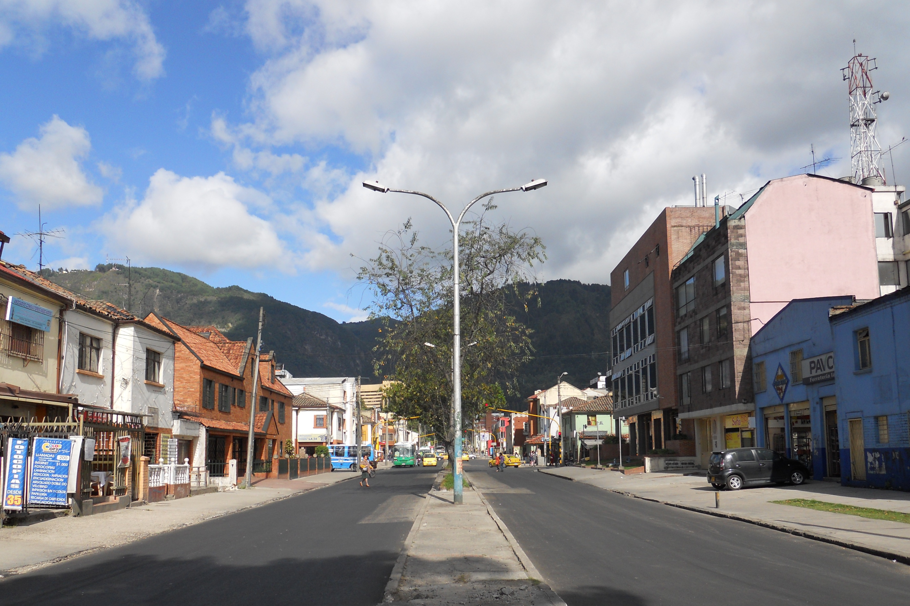 Calle 34 en Teusaquillo, en el centro de Bogotá.